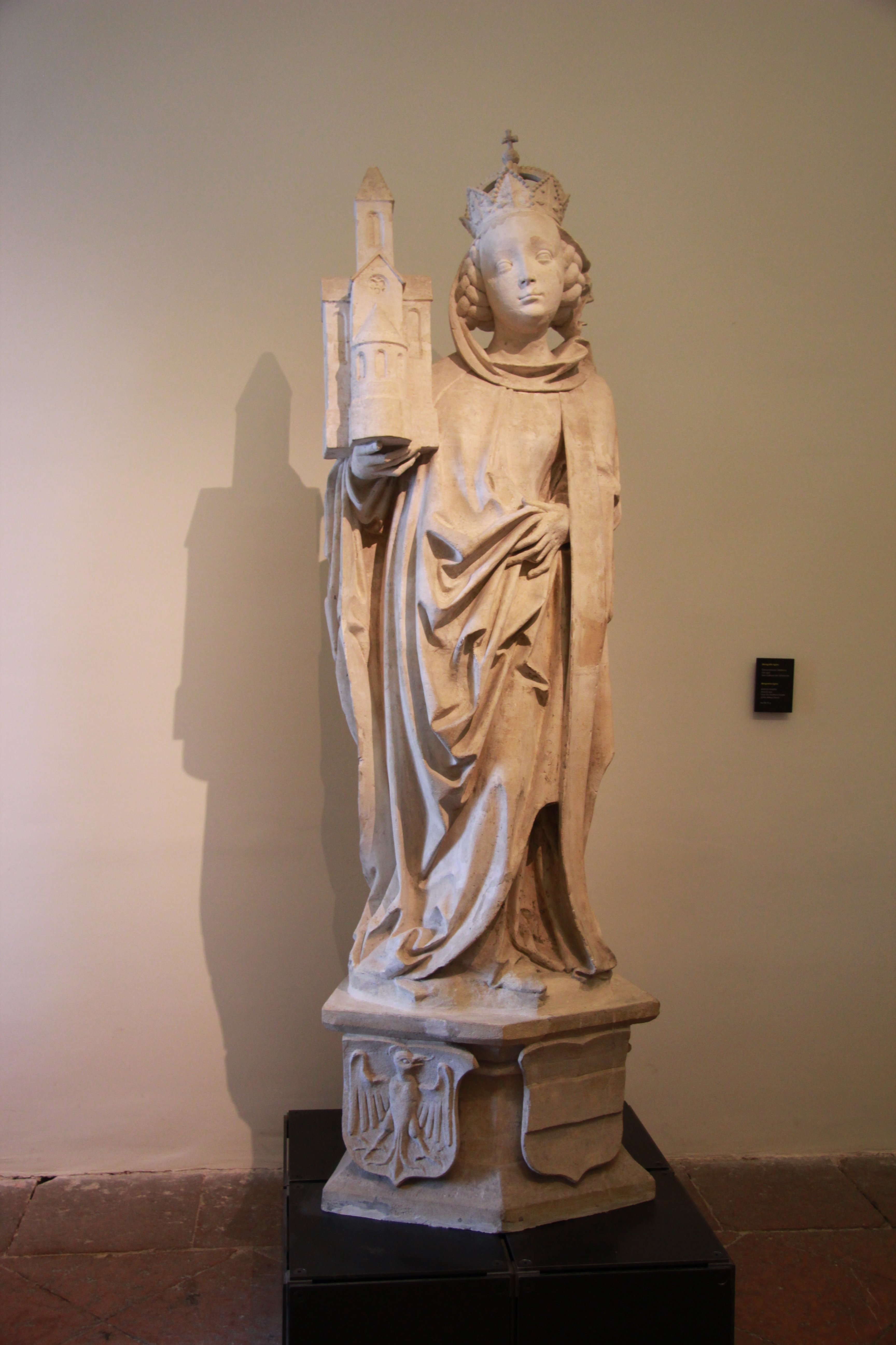 Originalstatue der Agnes von Waiblingen im Stift Klosterneuburg in Niederösterreich